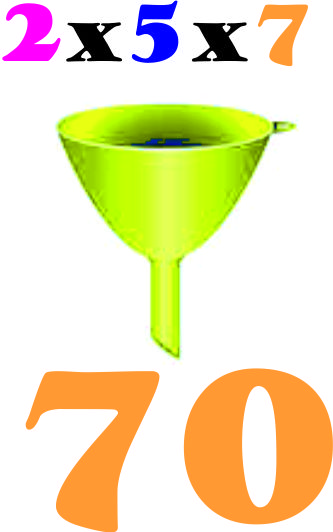 70 är ett sfensikt tal, det fjärde i ordningen.